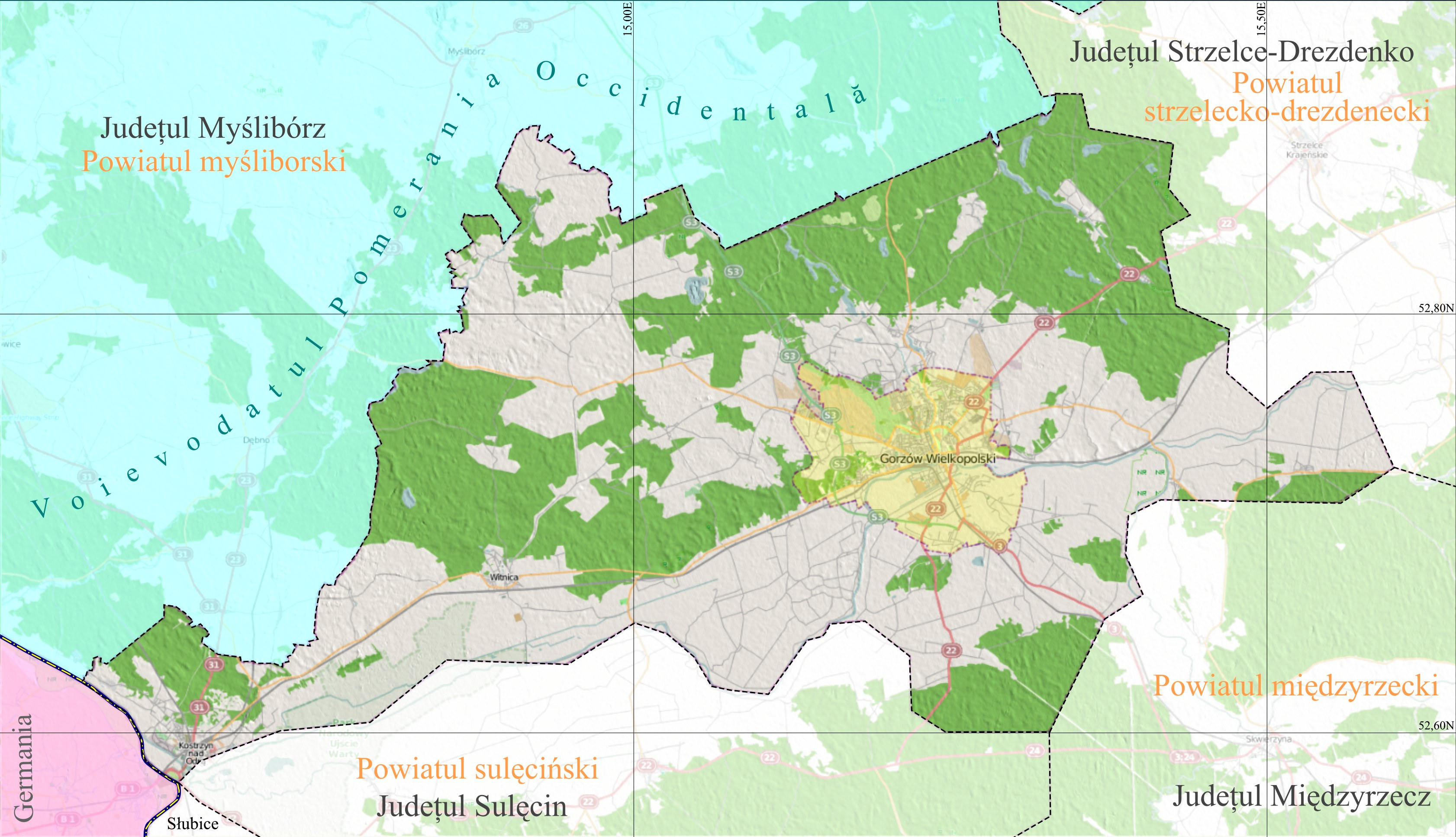 Harta de localizare a Judeţului Gorzów din Voievodatul Poloniei, Lubusz. Coordonate: Top: 52.95 Bottom: 52.55 Left: 14.50 Right: 15.65